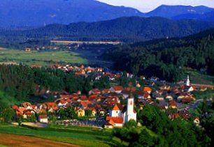 eigen